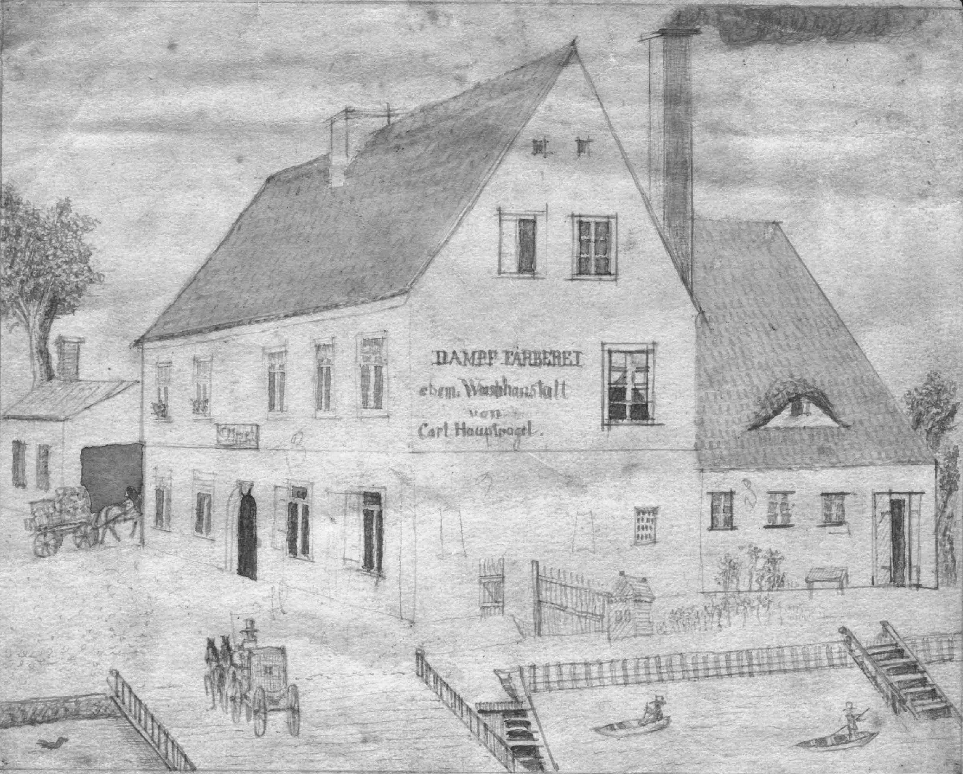 Färberei Hauptvogel in der heutigen Straße der Einheit 23 in Ortrand